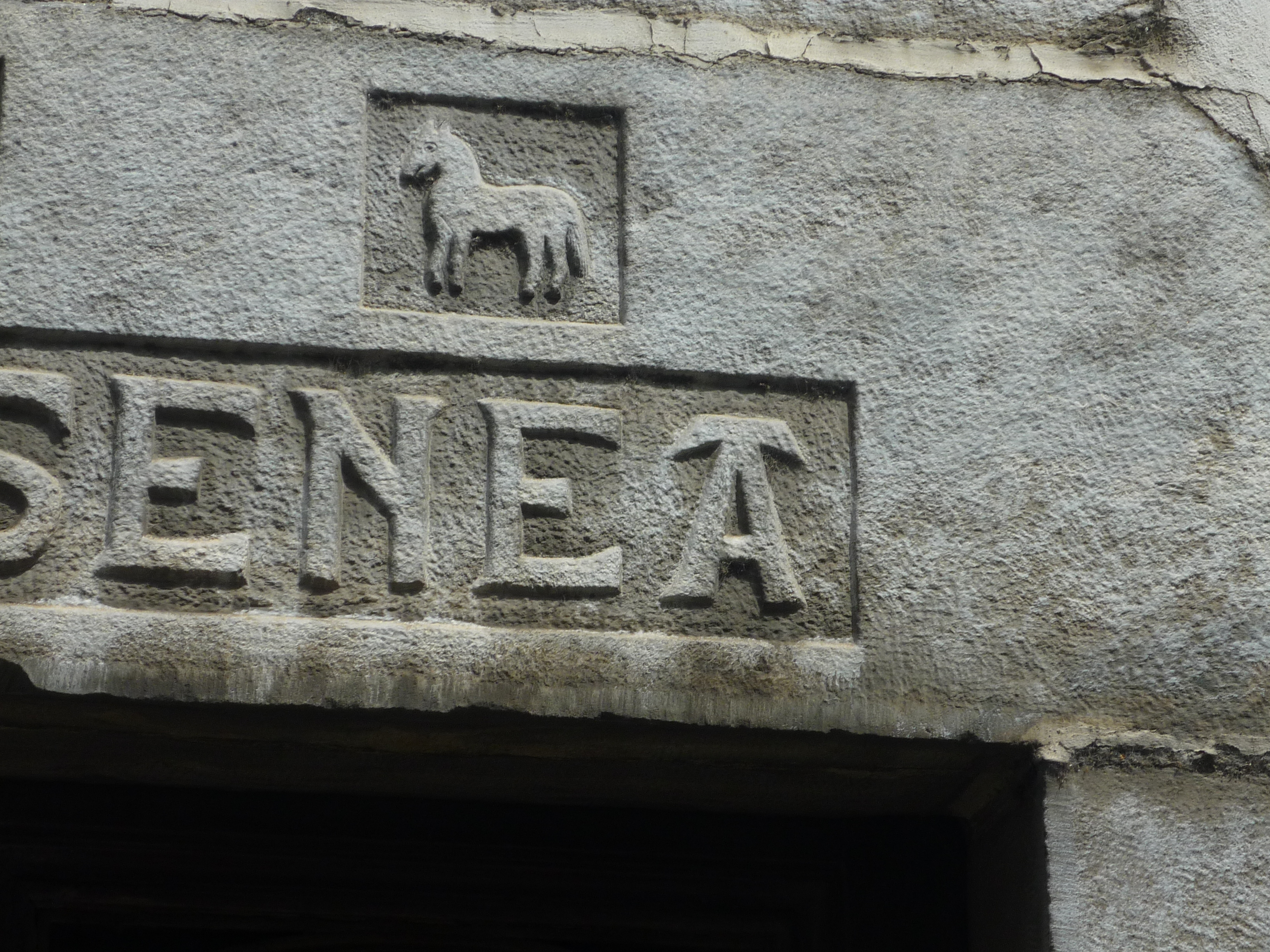 Pottokaren irudia Lesakako Juangosenean.